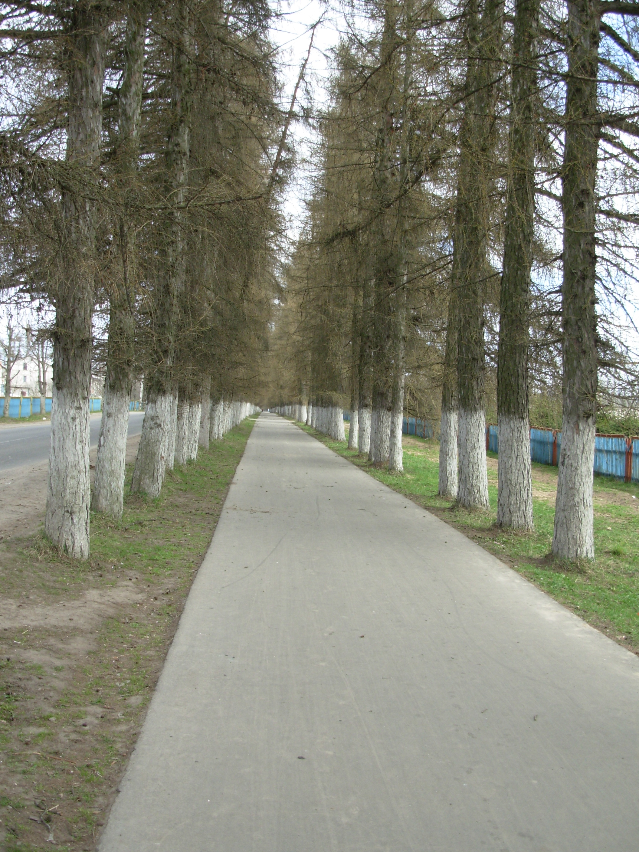 Беларуская (тарашкевіца): Алея лістоўніц, пасаджаных Д.Я. Лісоўскім